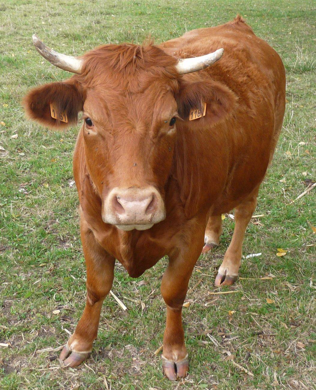 vachette limousine près de la Charente, à Lichères, Charente, France